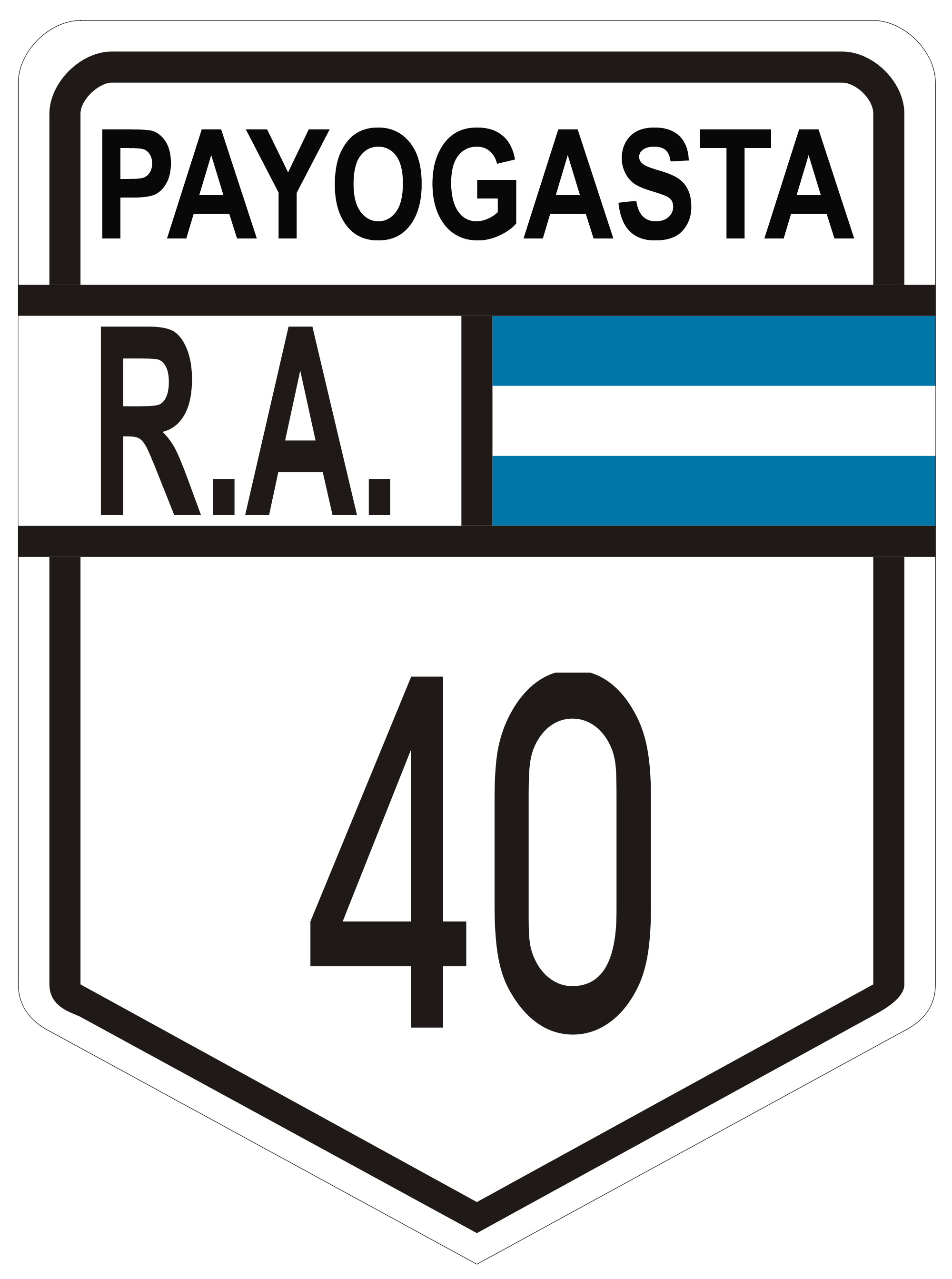 Payogasta - RN40